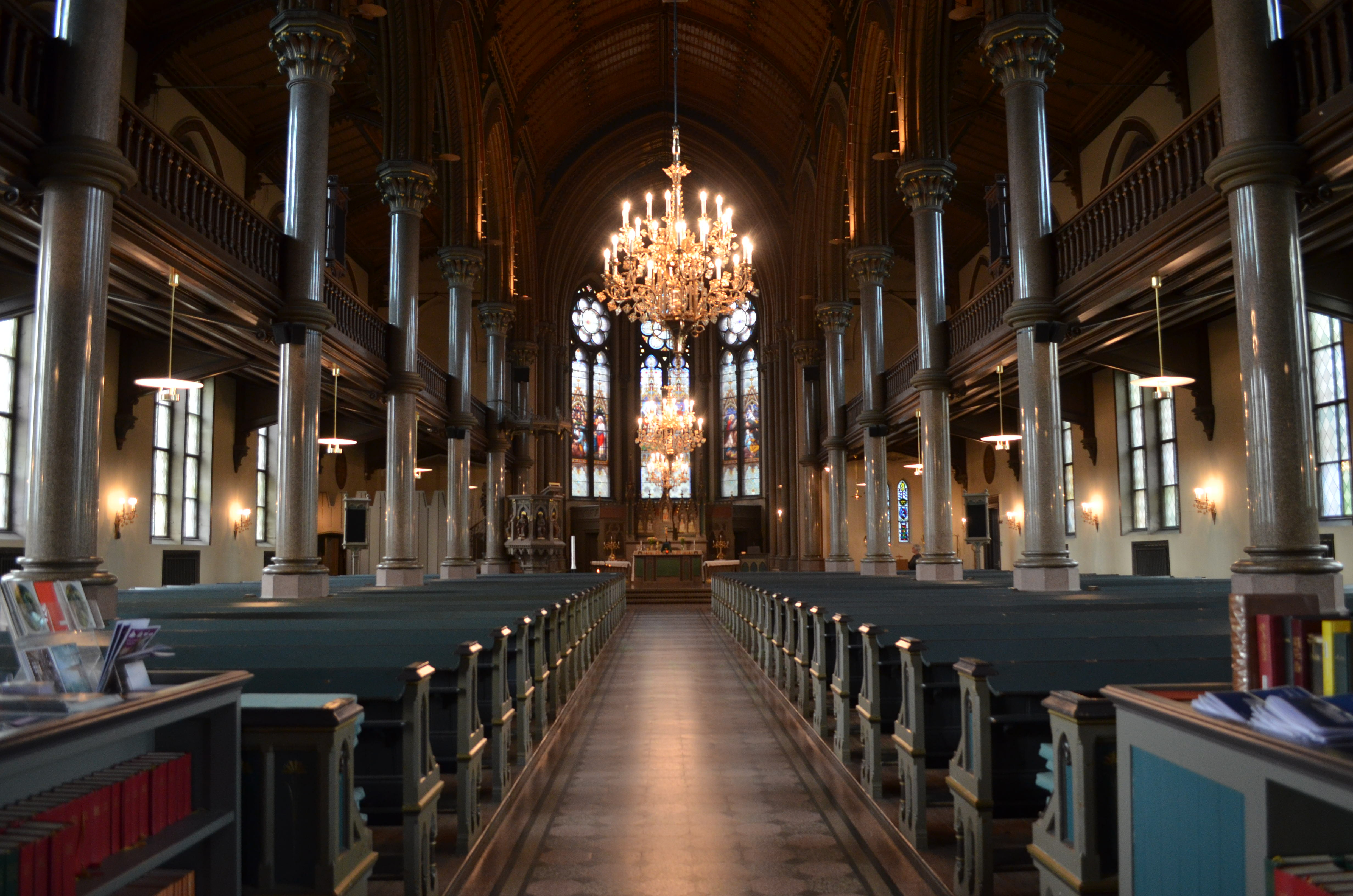 Kyrkosalen